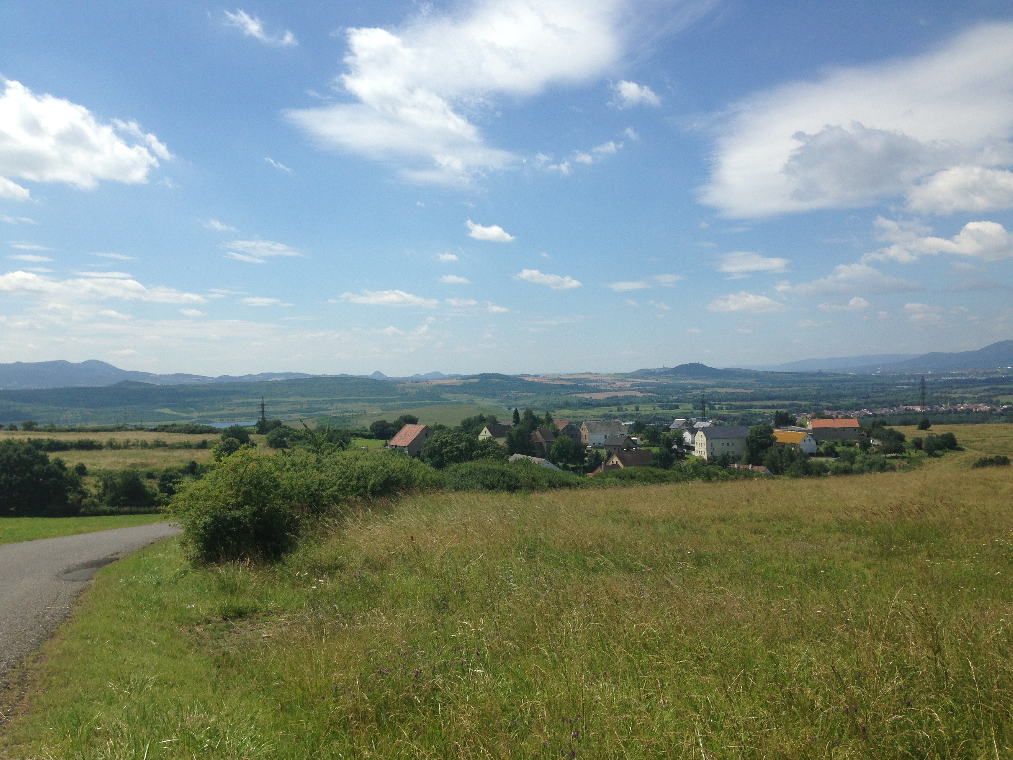 Pohled na Střížovice ze silnice č. III/25360 vedoucí na Všebořice